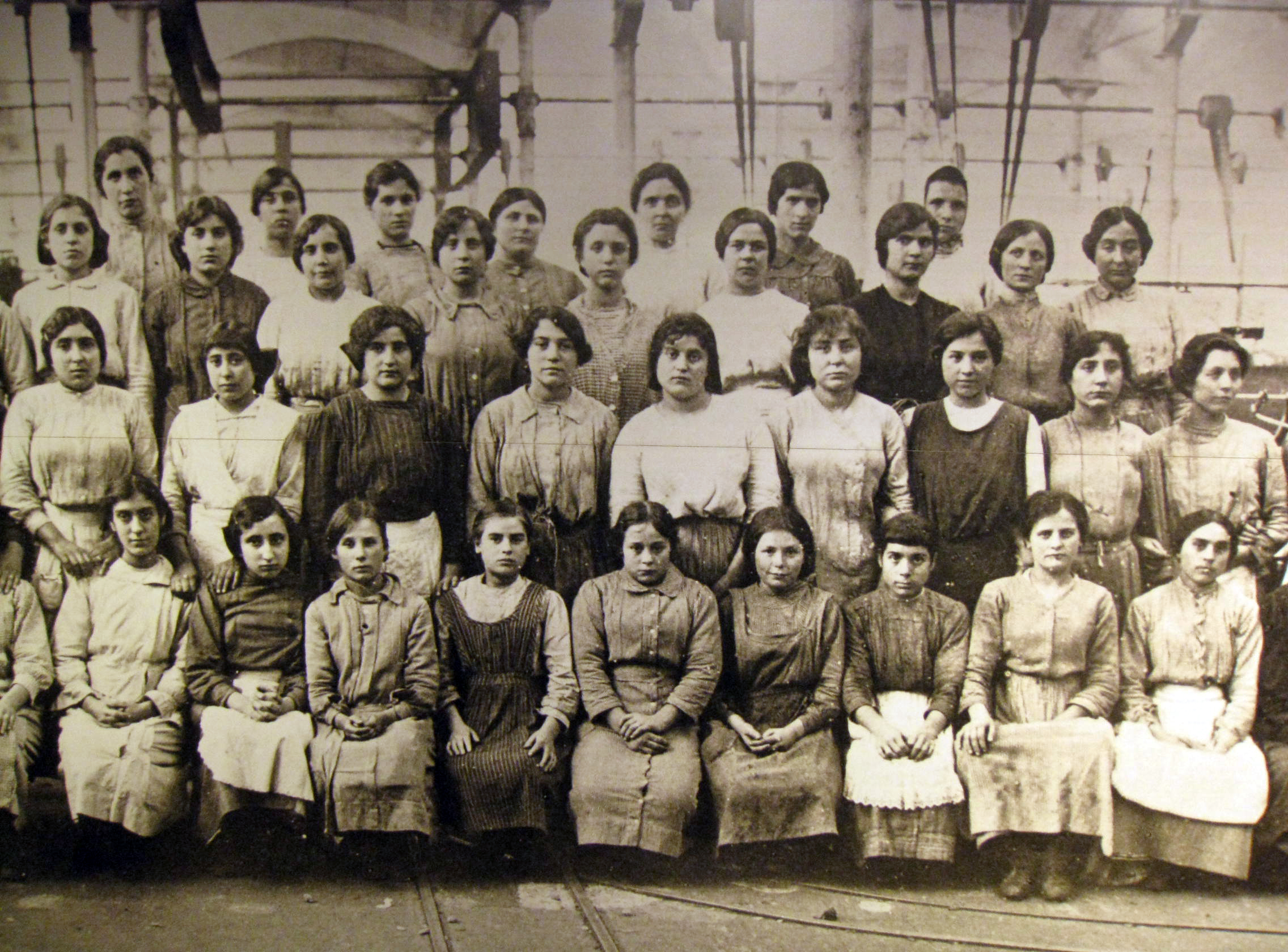 Fàbrica Aymerich, Amat i Jover (Terrassa) Object location41° 33′ 54.49″ N, 2° 00′ 28.14″ E